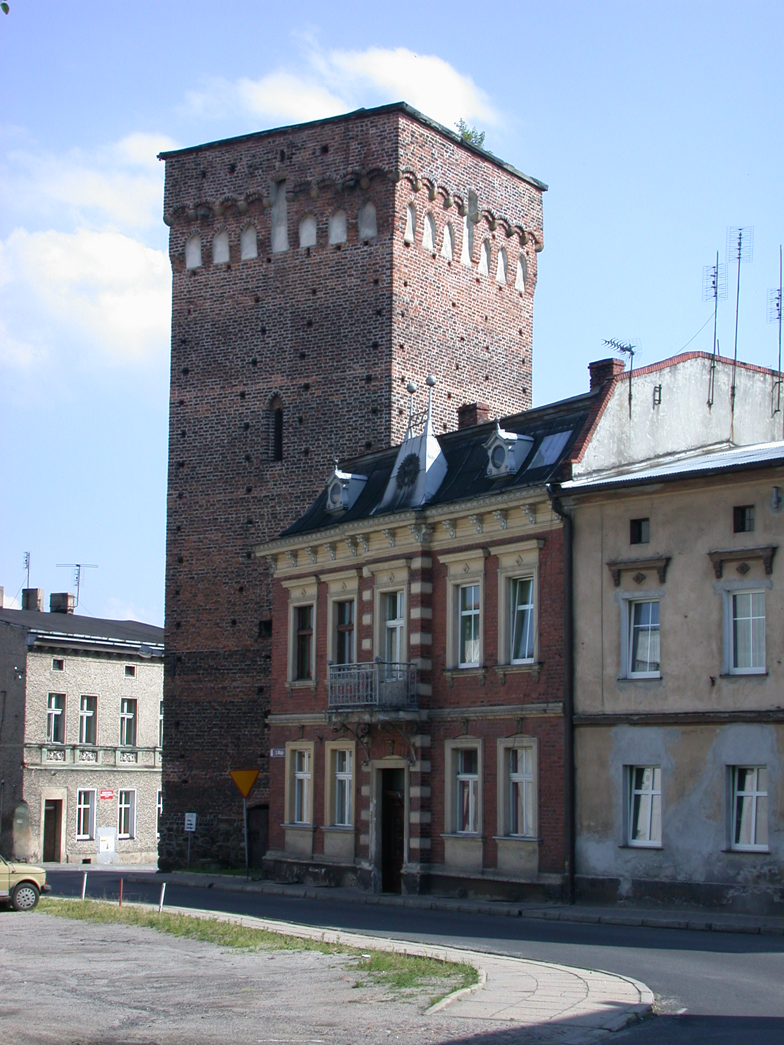 Biała - baszta - pozostałość dawnych murów miejskich